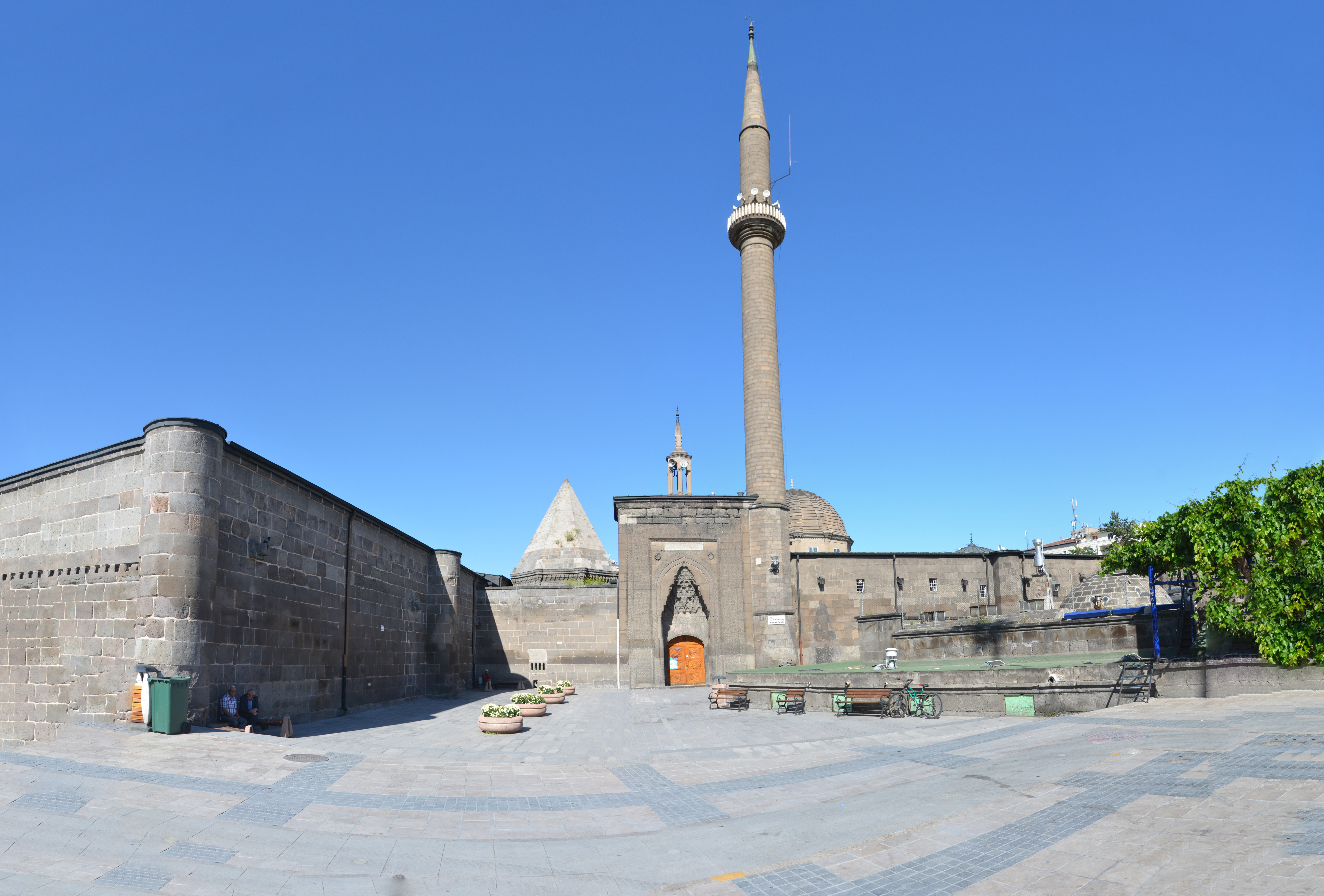 Hunad Hatun Külliyesinden bir görünüm.